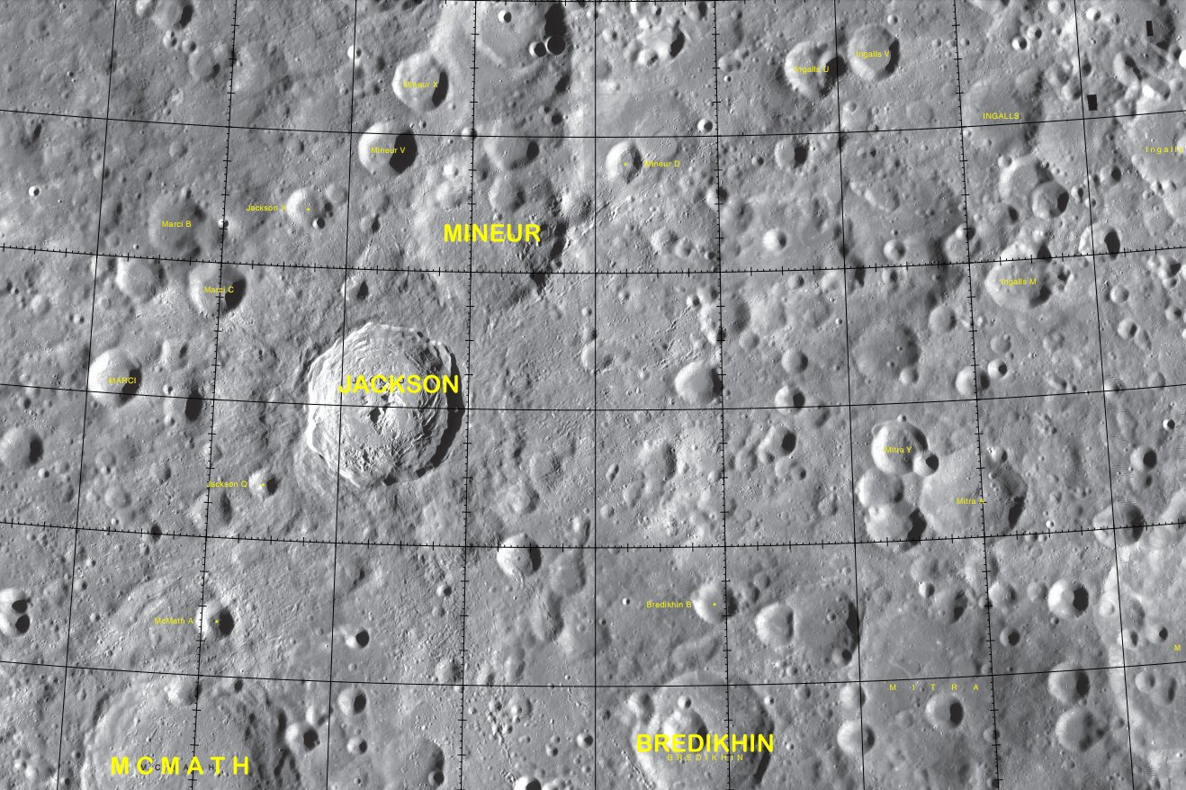 Cráter lunar Jackson. Localización. (Imagen LRO)